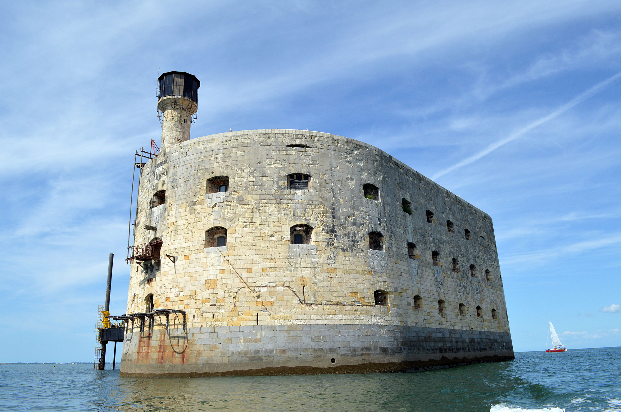 Fort Boyard - Charente-Maritime (août 2014)